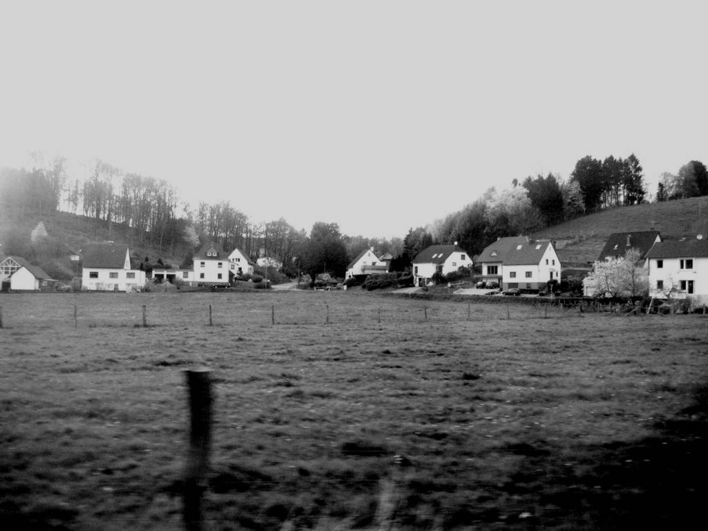 Linde-Bruch (Lindlar), Ansicht von Süden, April 2004